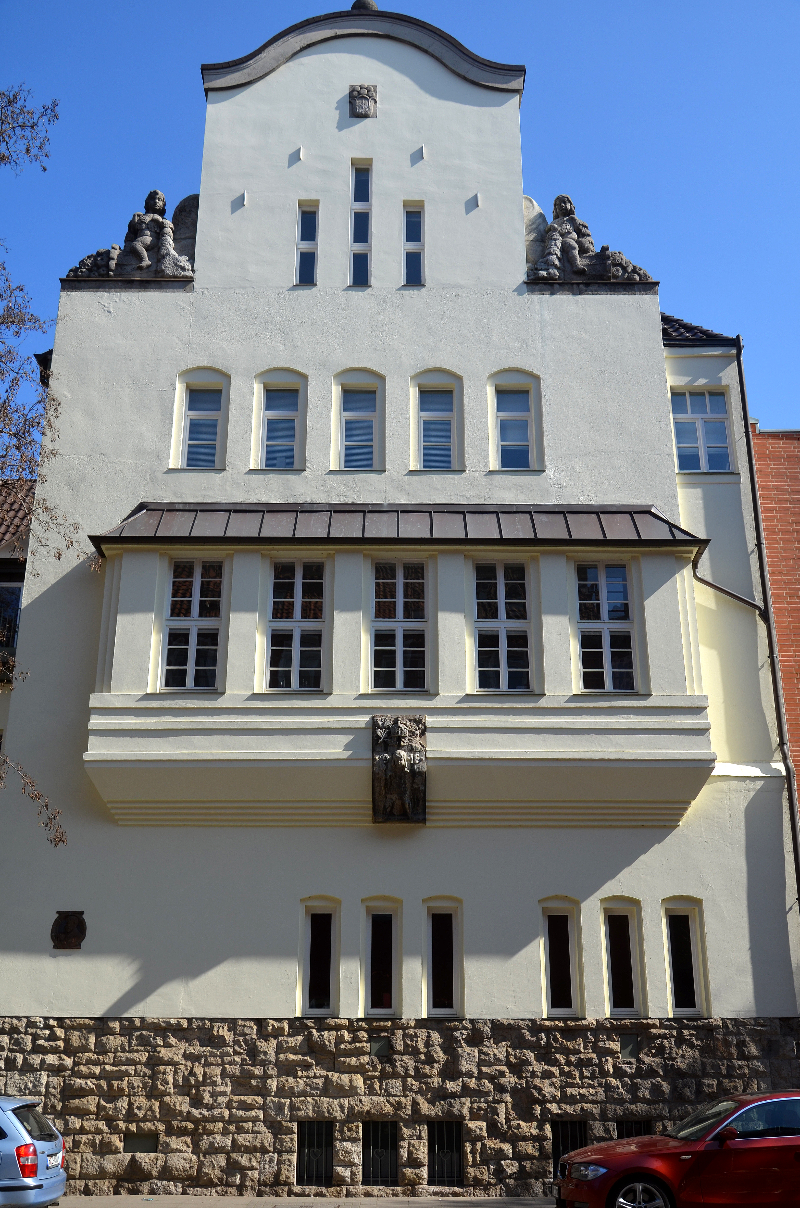 Vorderhaus Dieterichsstraße 17, frontaler Blick auf die Schau-Fassade des ehemaligen Gemeindehauses der evangelisch-lutherischen Gemeinde der Gartenkirche St. Marien. Die Jahreszahl unter der Krone und dem Kindergesicht - vermutlich 1916 - deutet auf das Baujahr hin. Weiter unten ist links ein Porträt eines Herrn mit Bart zu erkennen ...